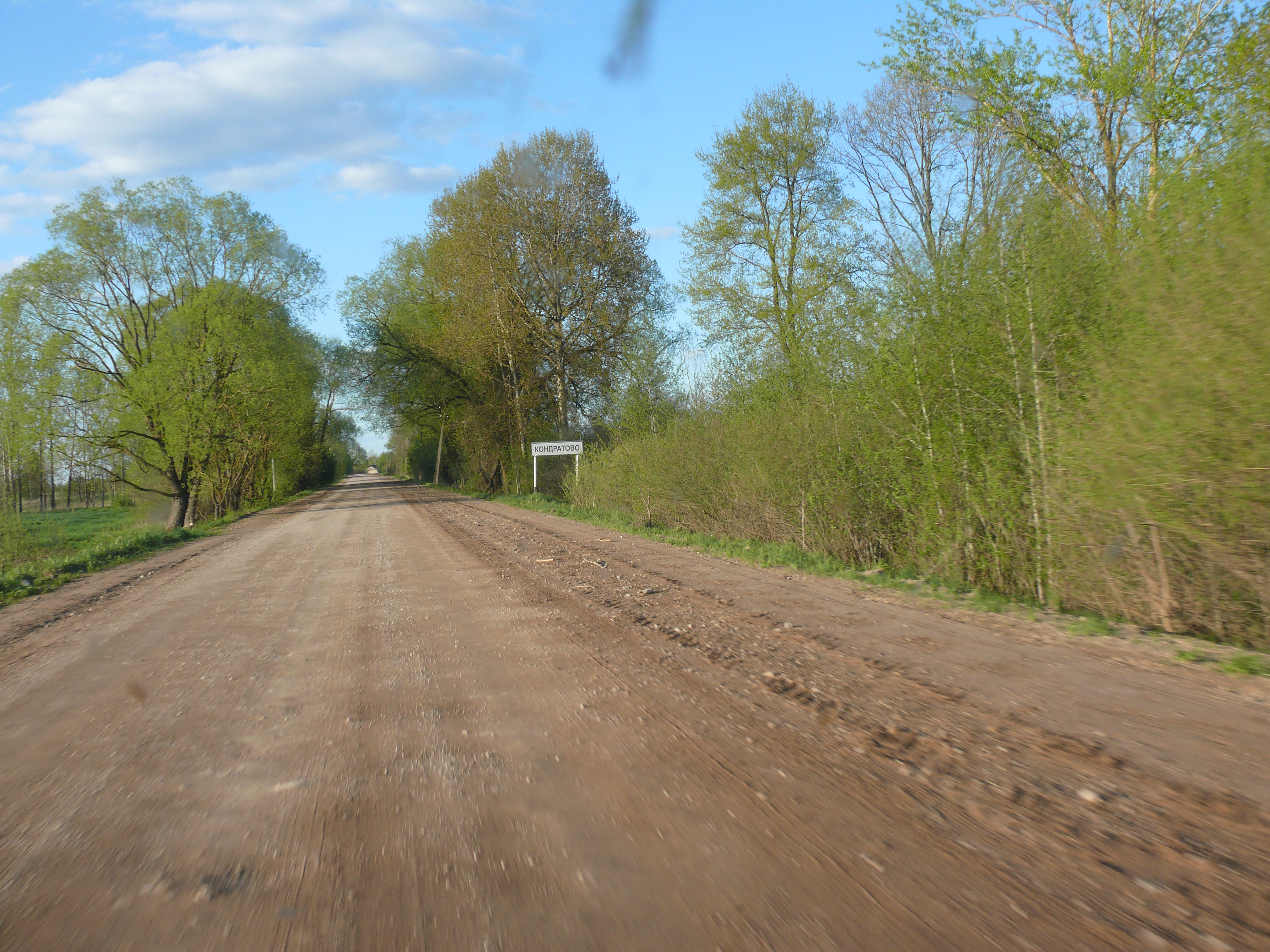 Деревня Кондратово Порховского района Псковской области